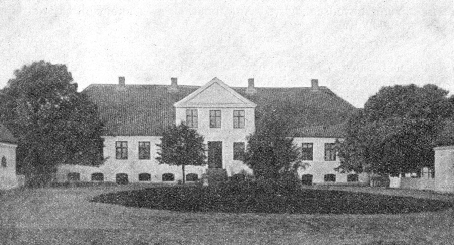 Ølstedgård er udstykket fra Brobygård i 1850. Gården ligger i Sønder Broby Sogn, Sallinge Herred, Broby Kommune. Ølstedgård er nu en del af Rudolf Steiner Skolen og kaldt Elmehøjen.